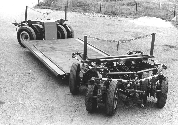 Tieflader von SCHEUERLE mit abfahrbaren Fahrwerken und Allradlenkung